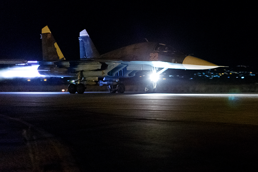 Ночные вылеты с авиабазы «Хмеймим» в Сирии